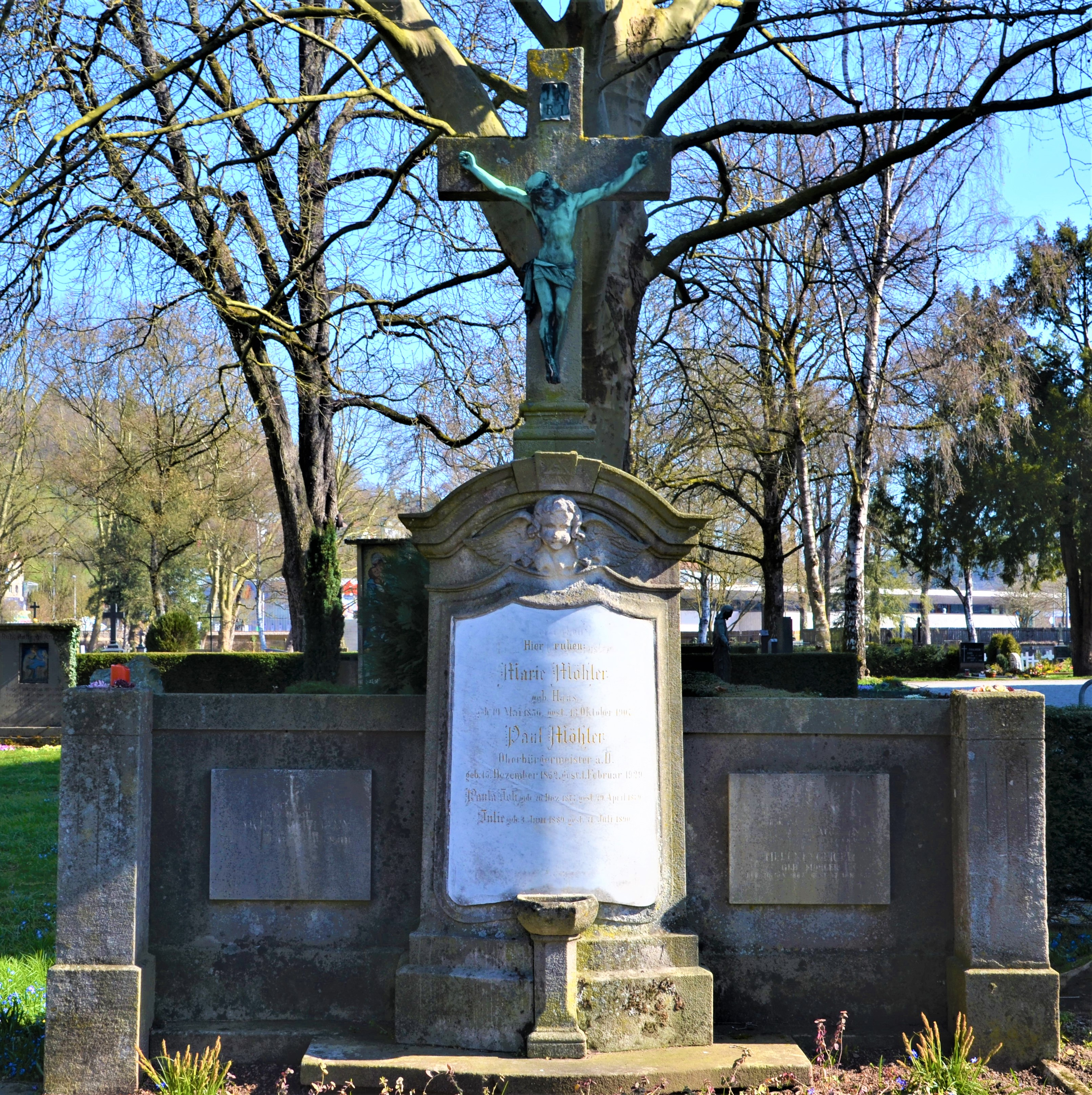 Grabmal von Oberbürgermeister Paul Möhler auf dem Leonhardsfriedhof Schw. Gmünd